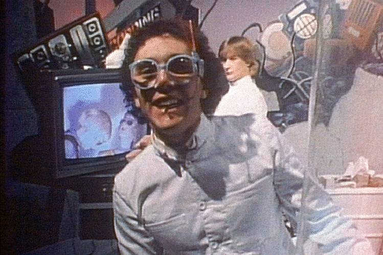 The Buggle-en "Video Killed The Radio Star" bideokliparen irudi bat.